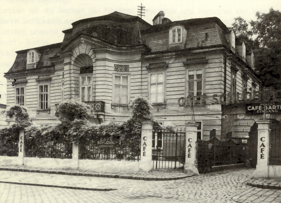 Villa XAIPE (Ende 18. Jh.) beim Meidlinger Tor zum Schlosspark Schönbrunn, Foto um 1930